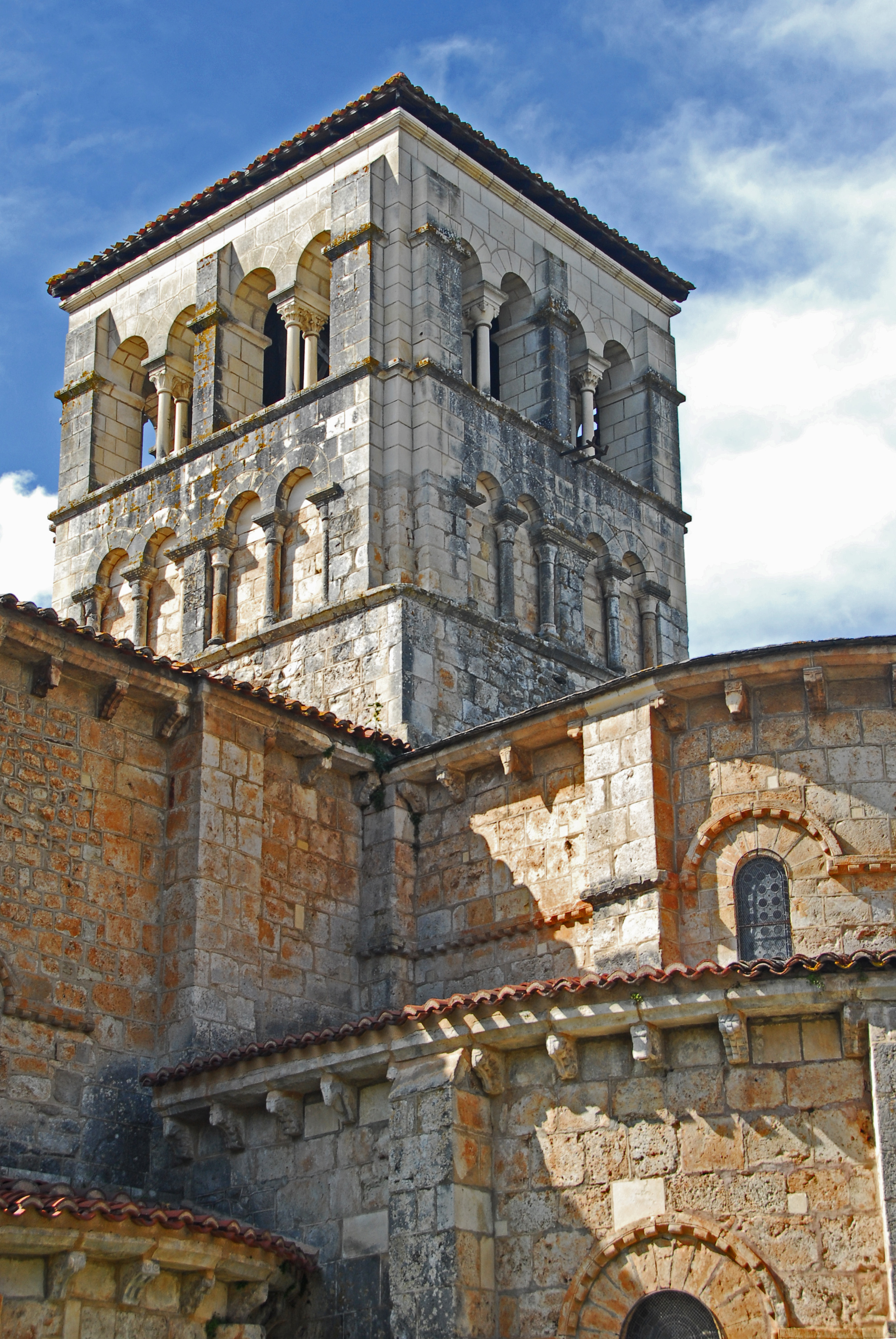 Ste-Croix de Veauce, Vierungsturm von SO